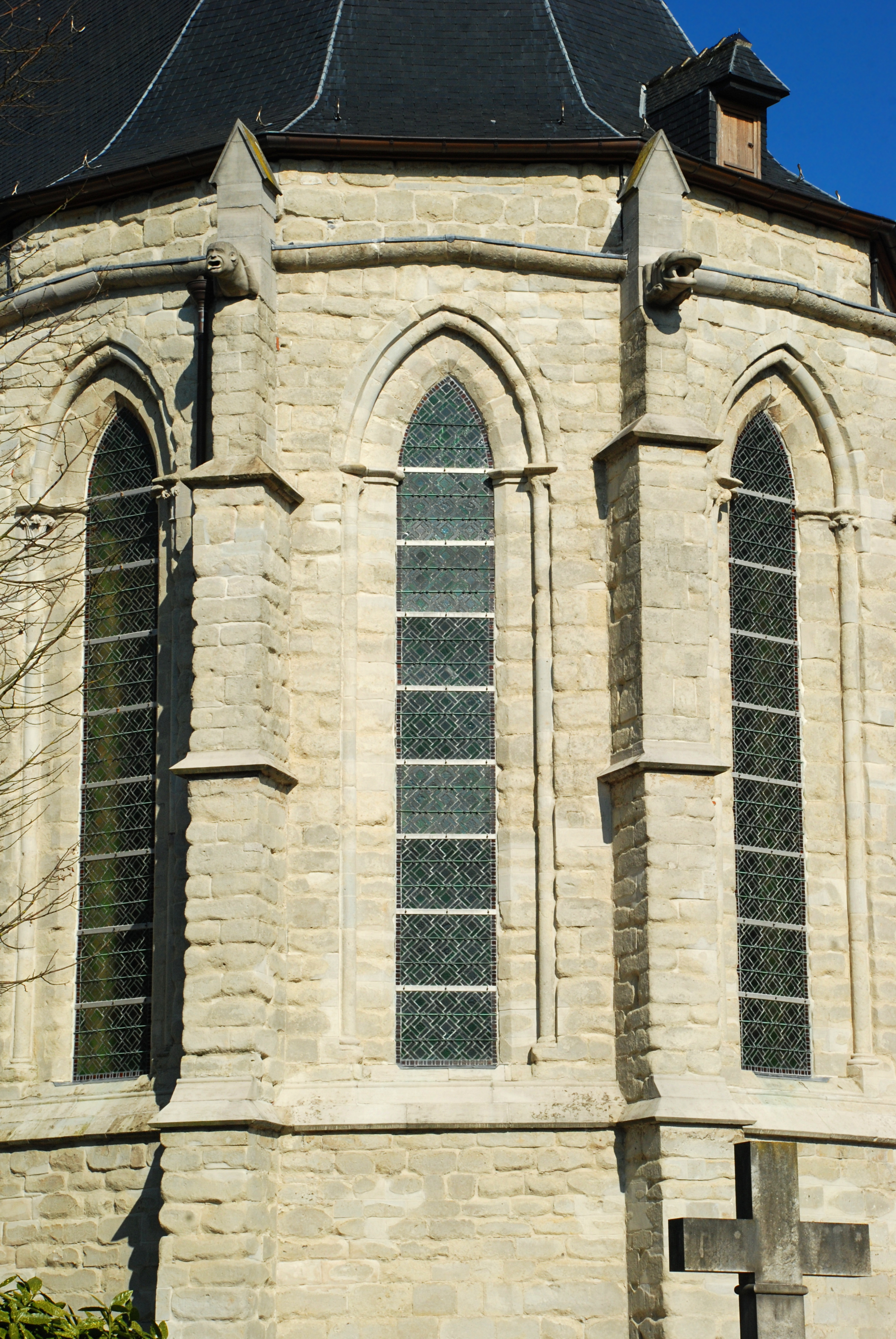 Belgique - Bruxelles - Ancienne église Notre-Dame de Laeken (gothique 13e siècle)